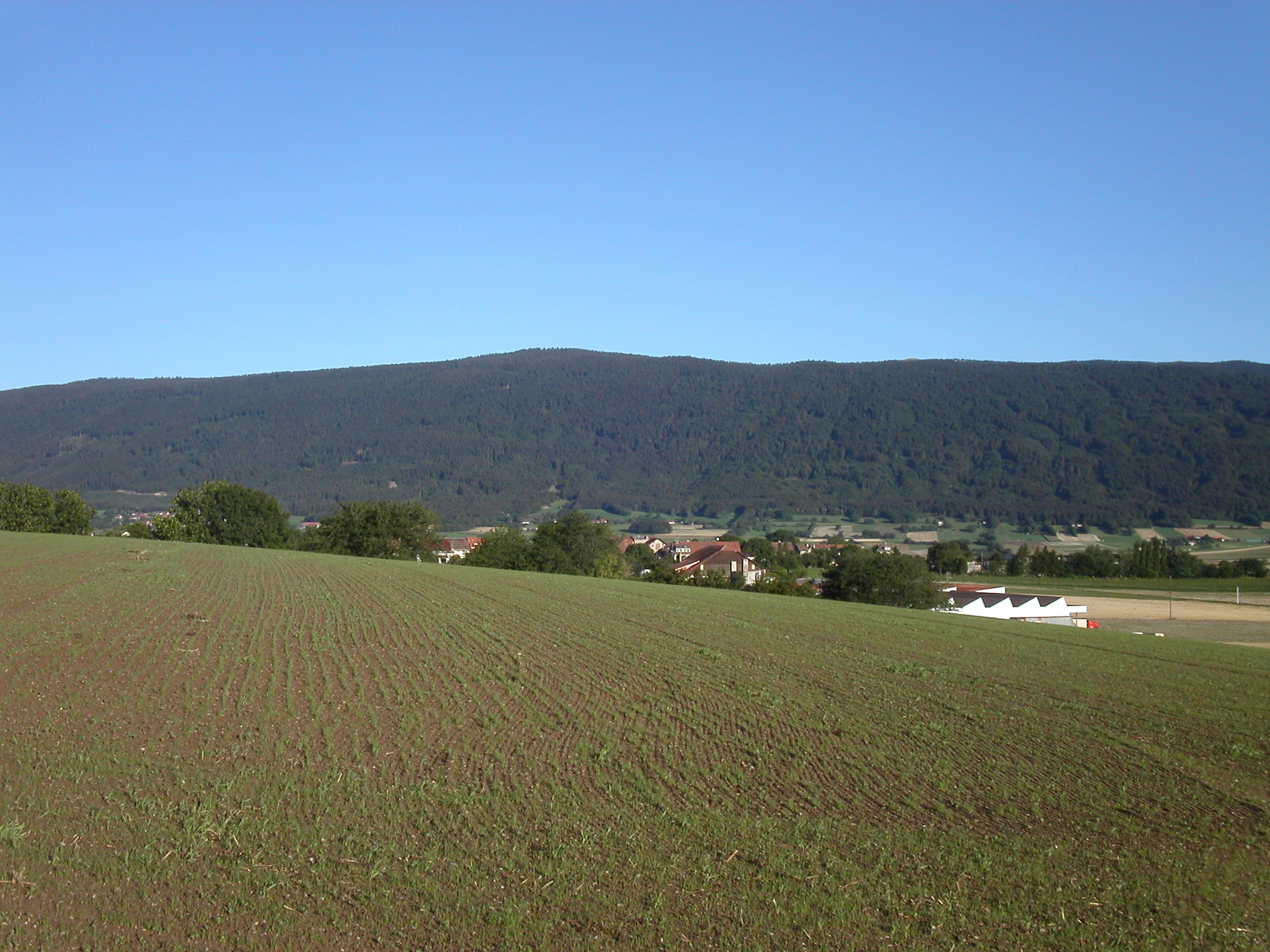 Ballens, Vaud, Suisse